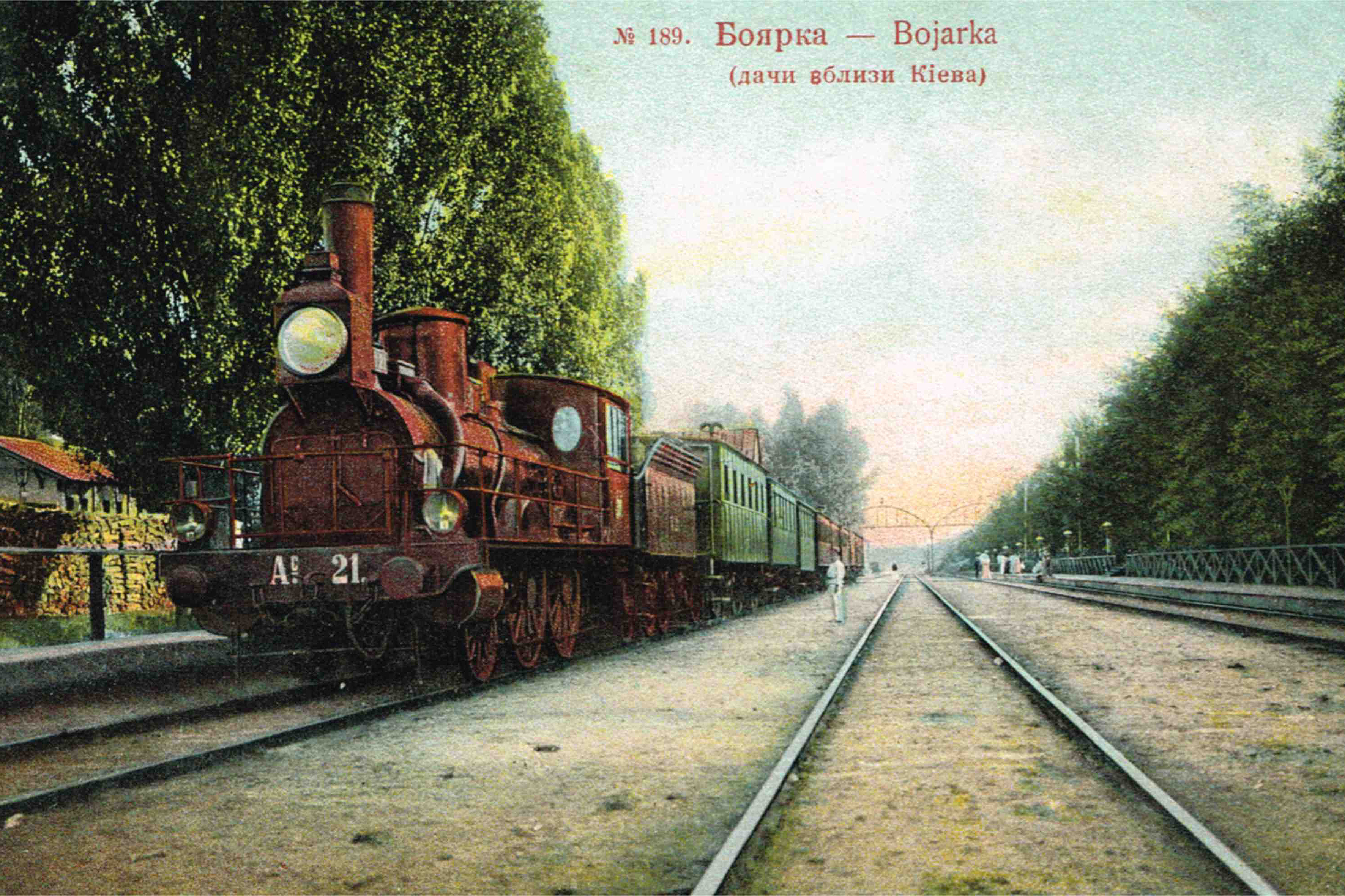 Залізнична станція в Боярці